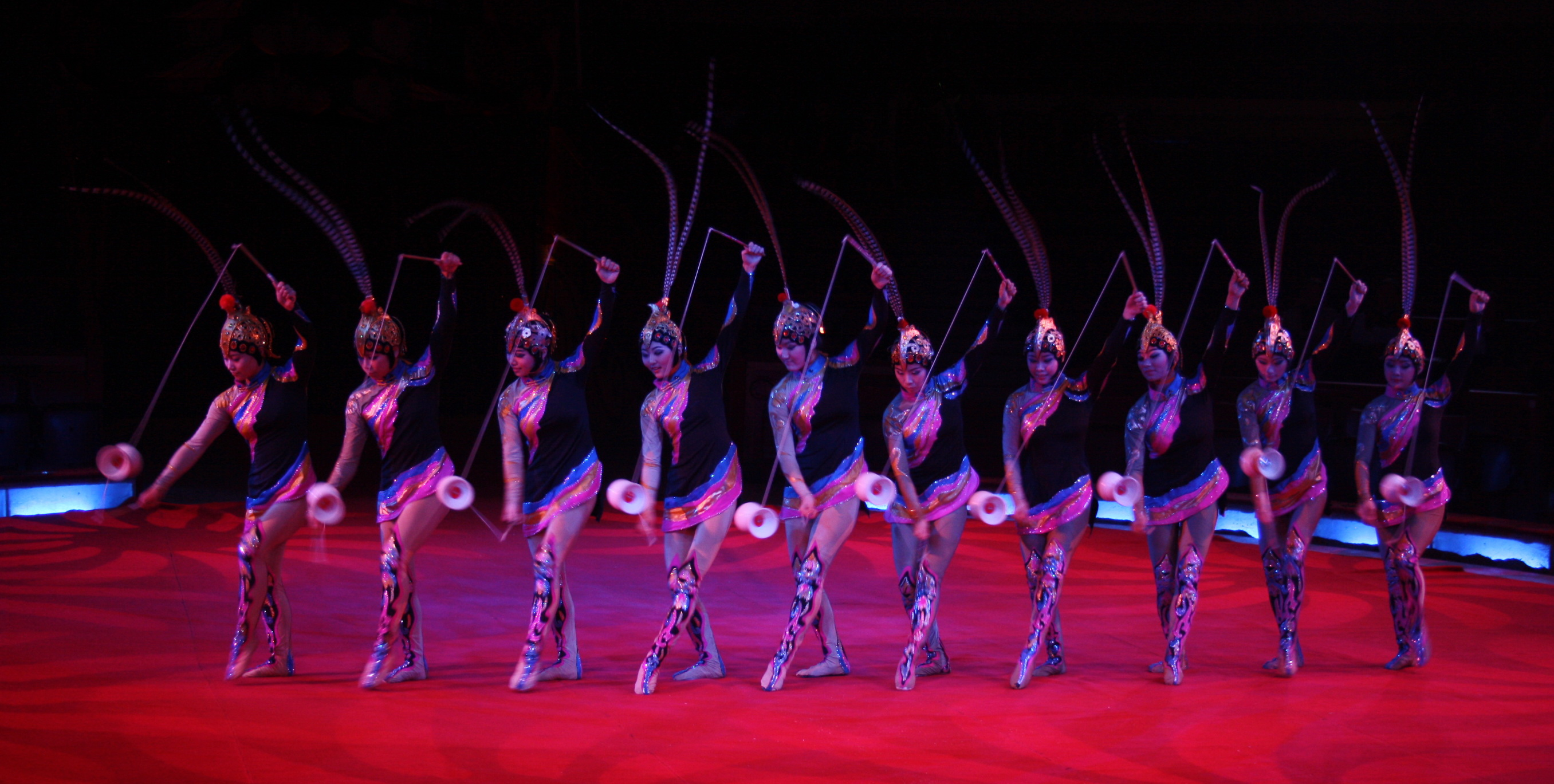 China National Acrobatic Troupe - Show mit Diabolos